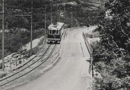 Percorso Trento-Malé 1955